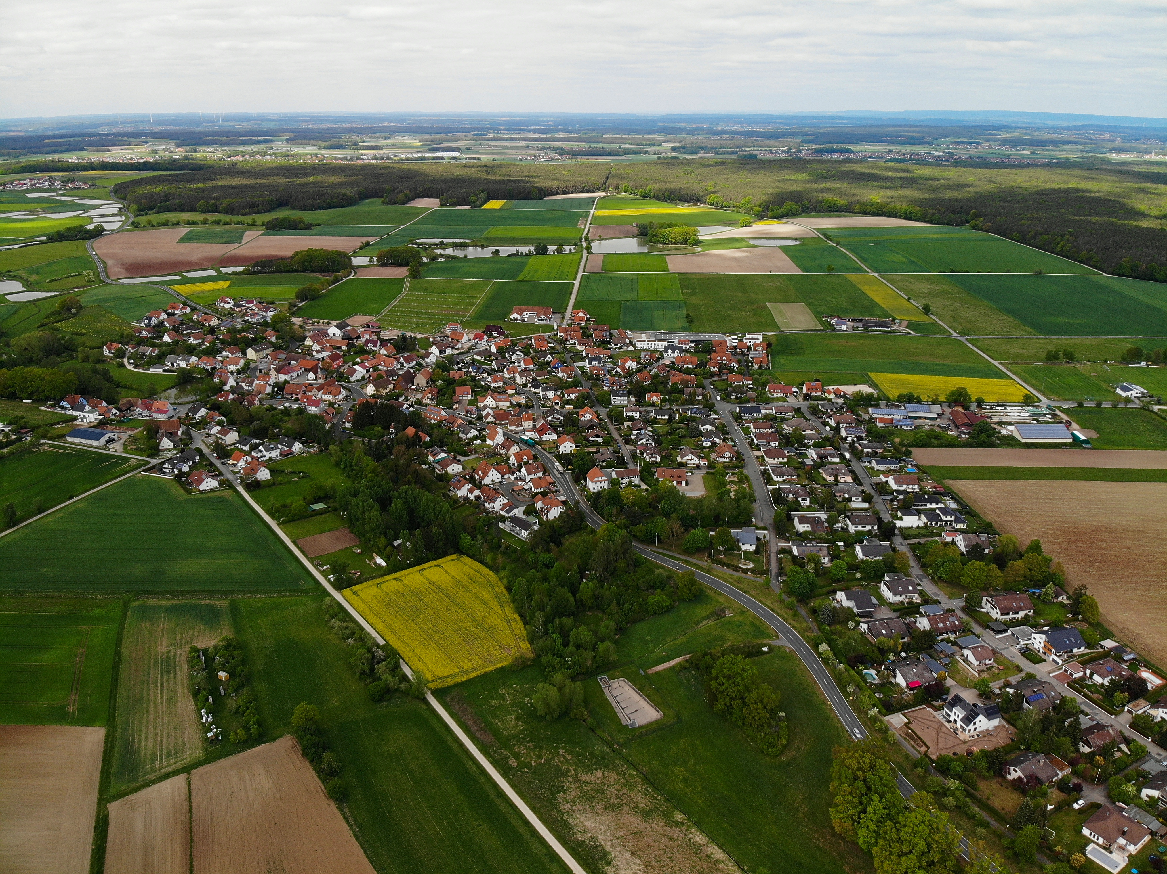 Hammerbach (Herzogenaurach) Luftaufnahme (2020)